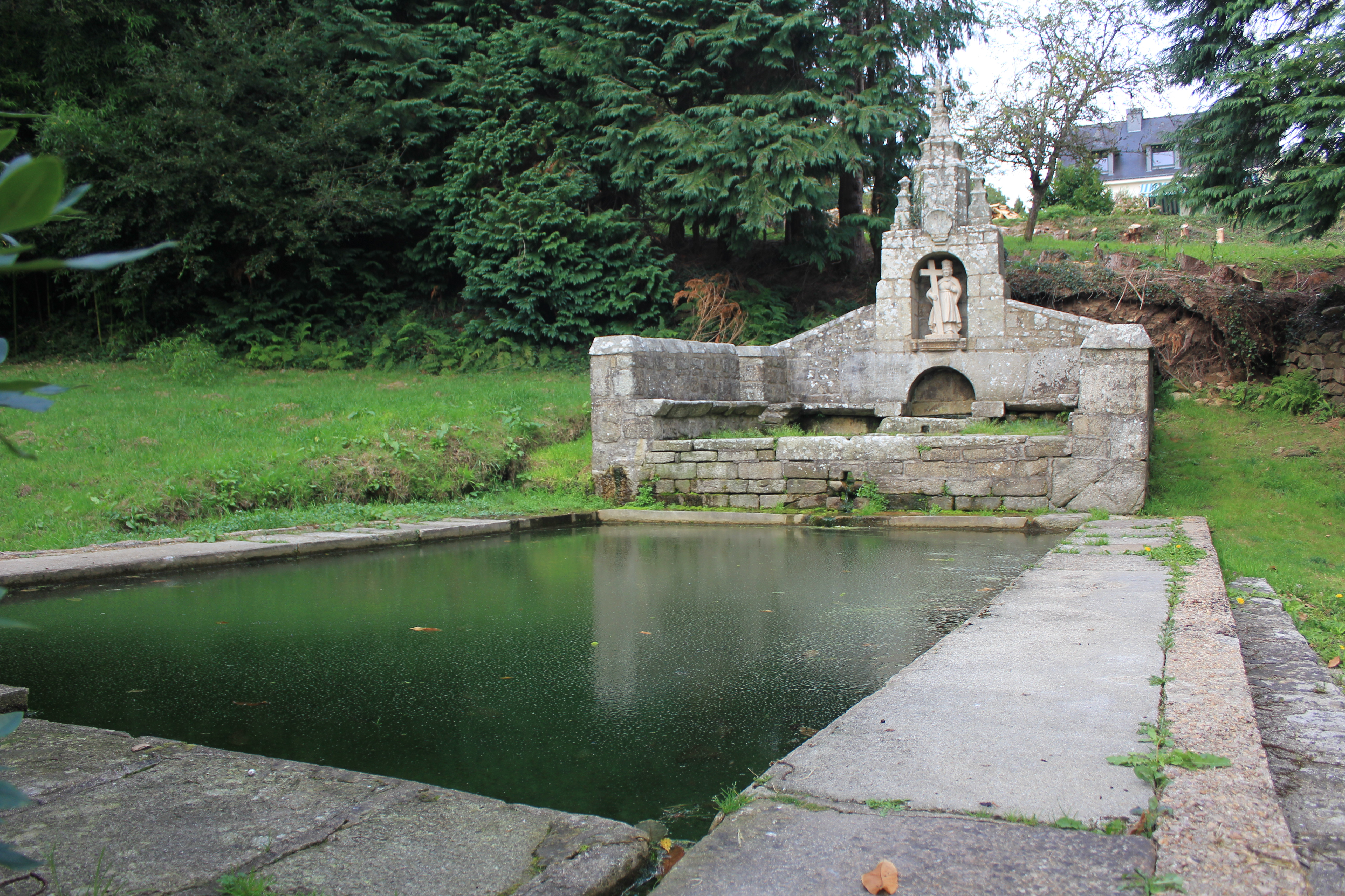 Chapelle Sainte-Hélène (Bubry) .